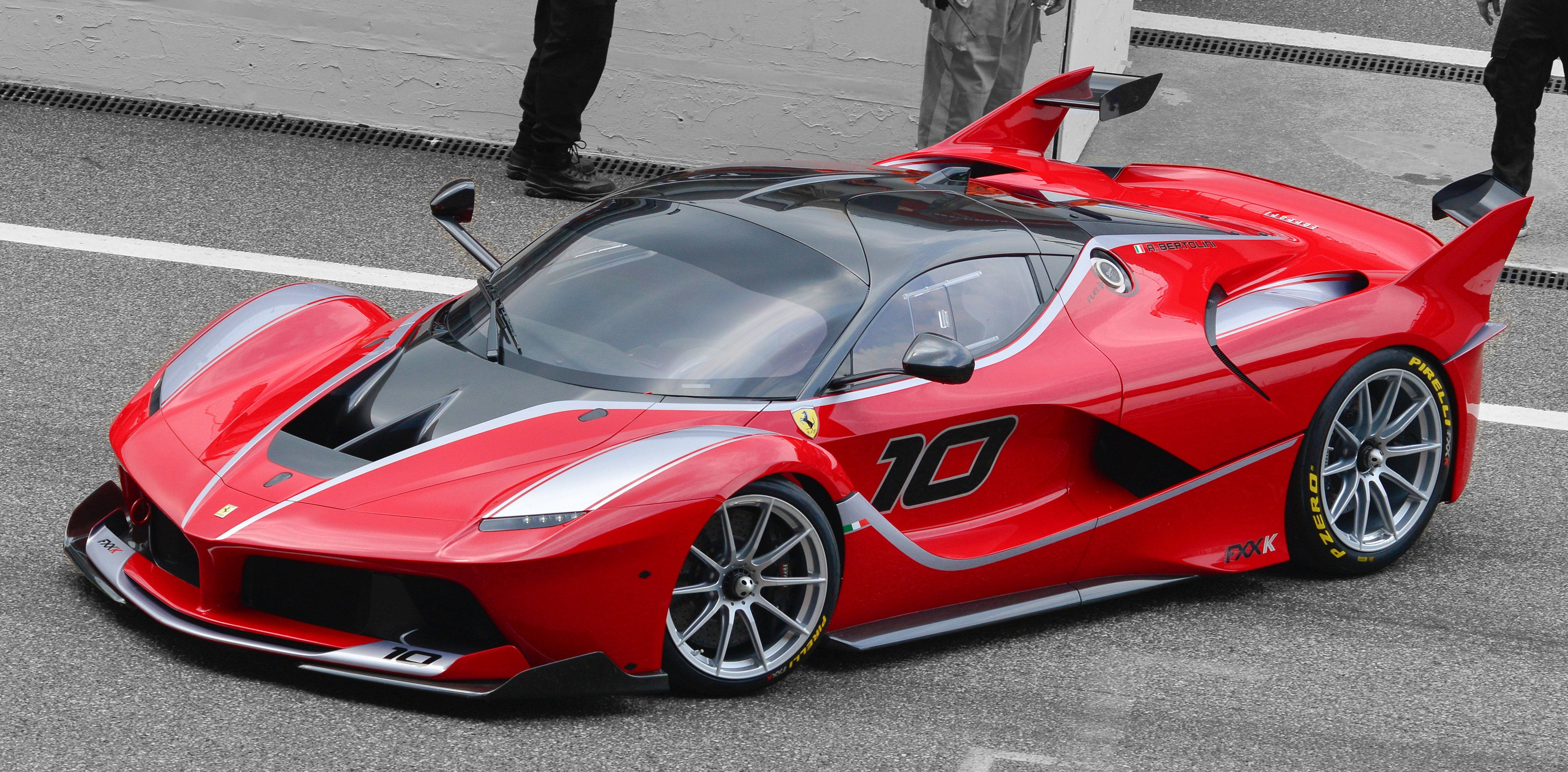 Una Ferrari FXX K a Shanghai